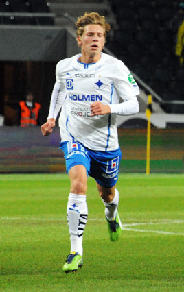 Alexander Fransson